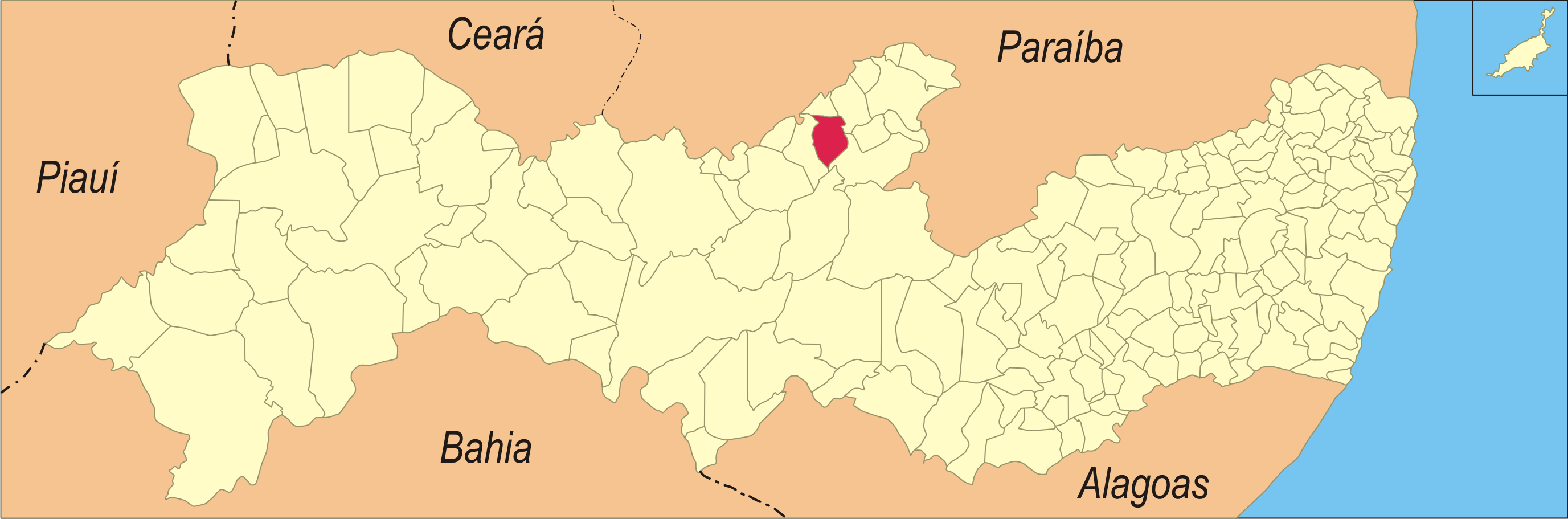 Localização da cidade no estado de Pernambuco